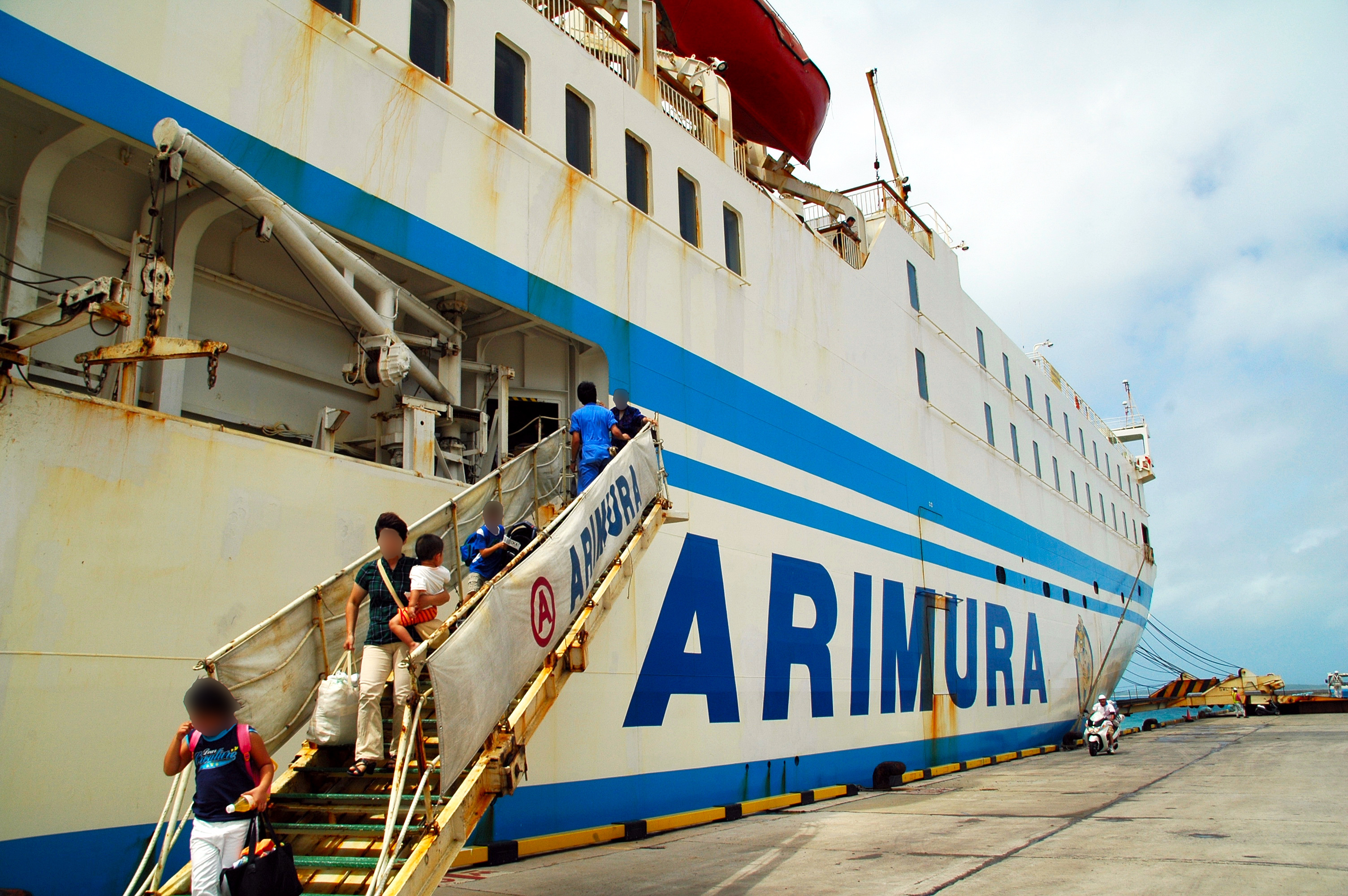 有村産業「クルーズフェリー飛龍」石垣港にて